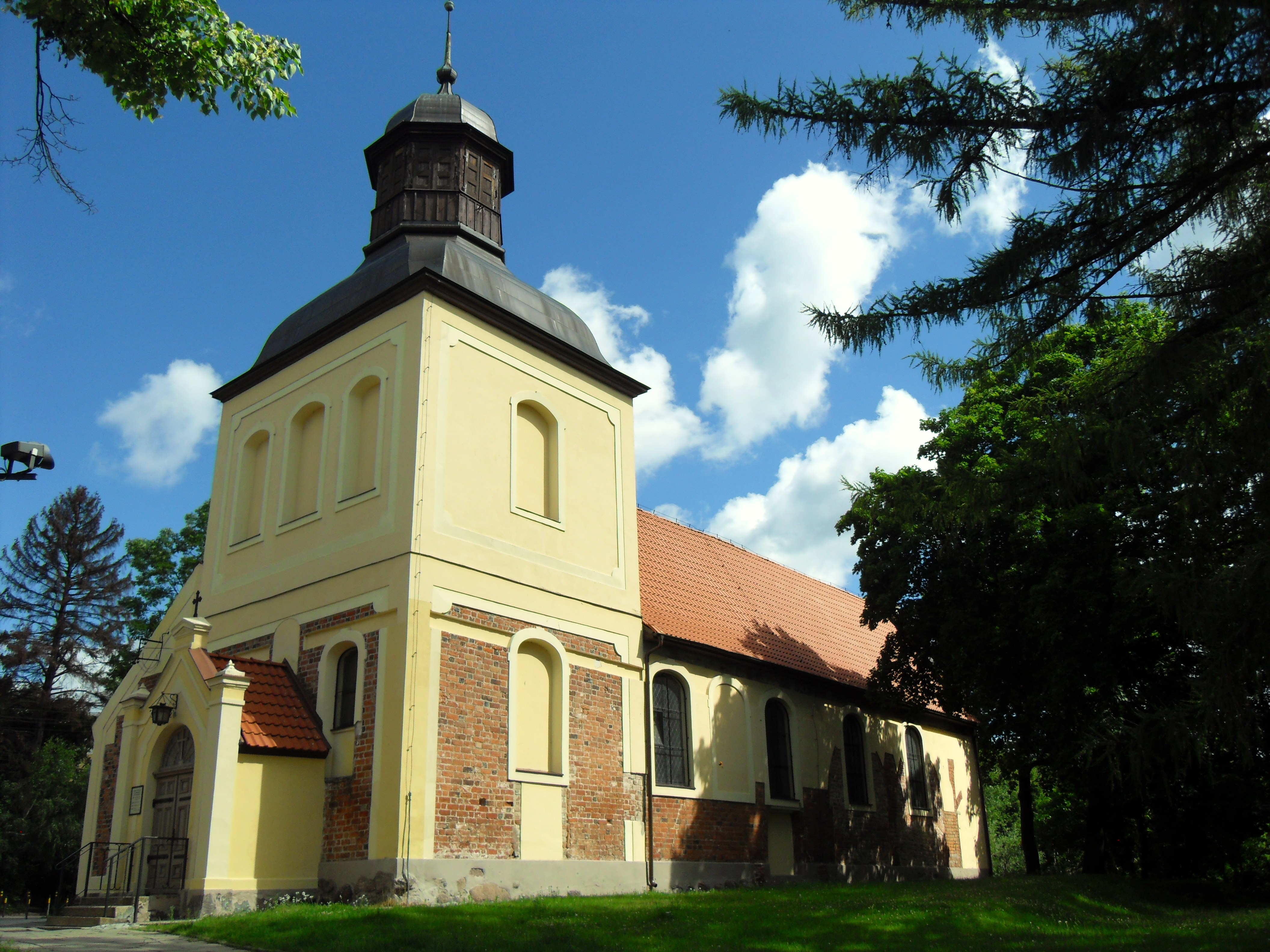 Gdańsk Oliwa, ul. Opacka - rzymskokatolicki kościół parafialny, obecnie filialny p.w. św. Jakuba, XIV-XV, 1709, 2 poł. XIX